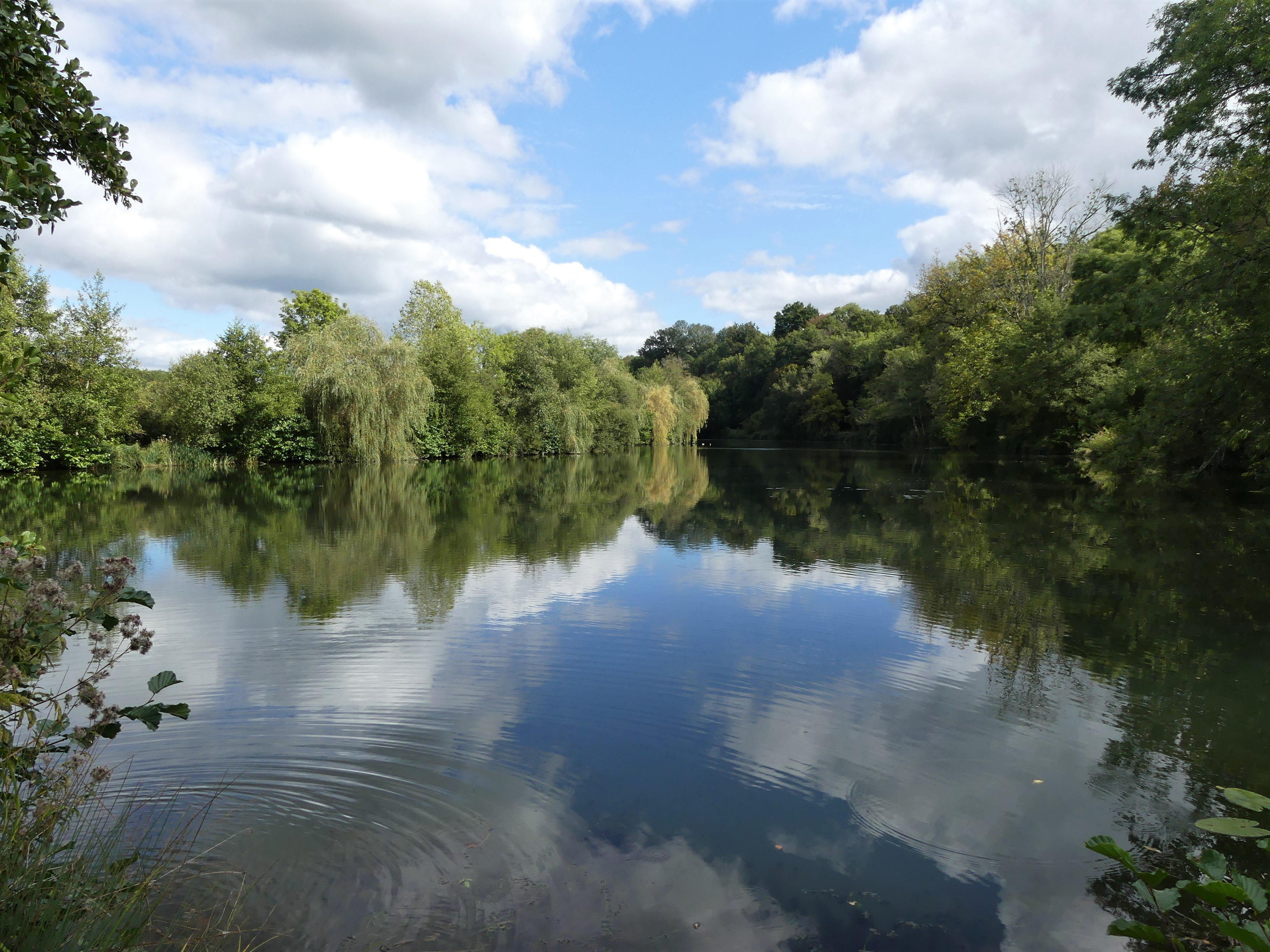 Alimenté par la Nizonne, l'étang de Lavergne marque la limite entre Mareuil en Périgord (ancienne commune de Saint-Sulpice-de-Mareuil) (à gauche) et Rudeau-Ladosse (à droite), Dordogne, France. Vue prise en direction de l'amont.